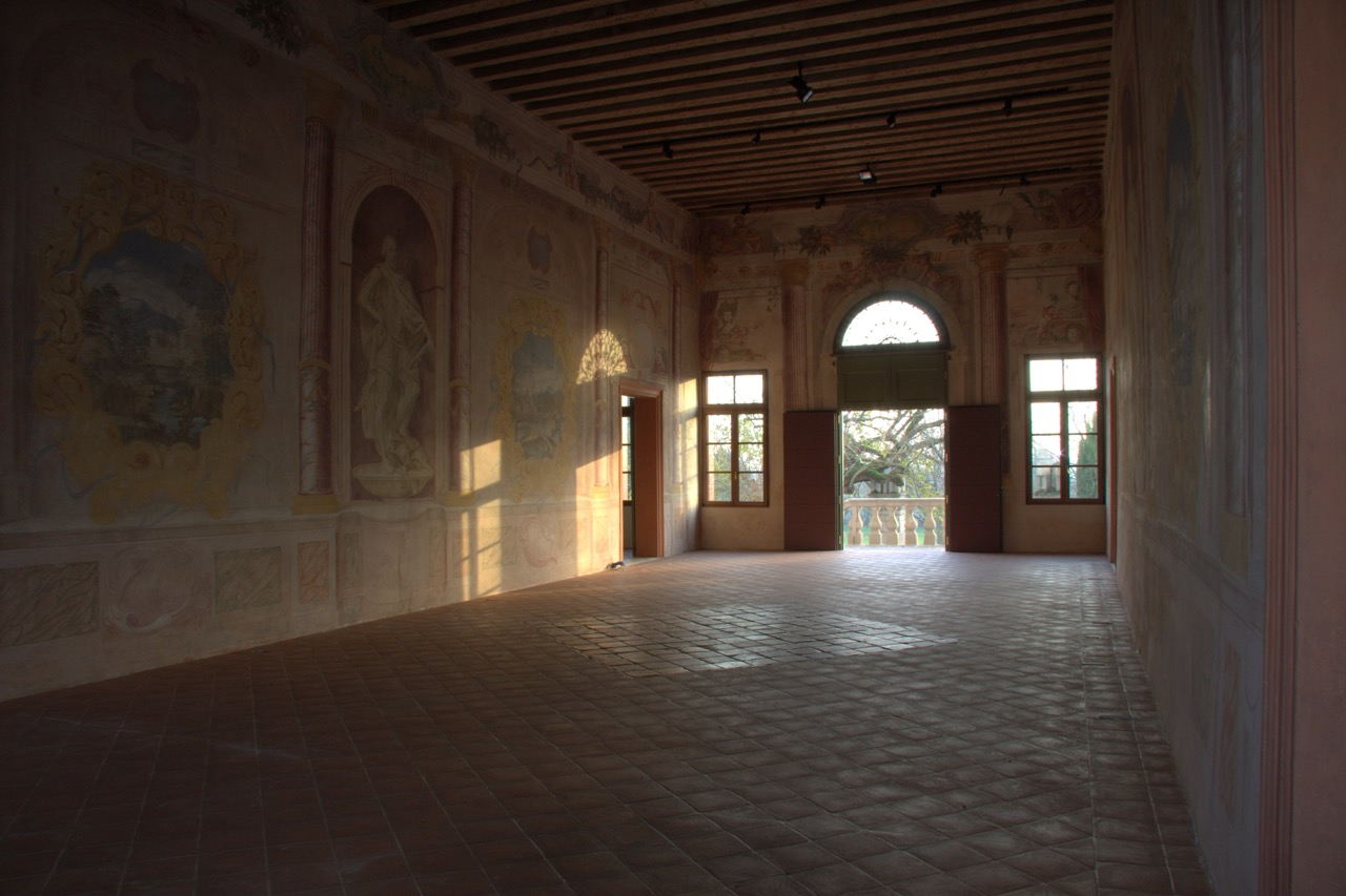 Salone centrale di villa Buzzaccarini (Monselice)